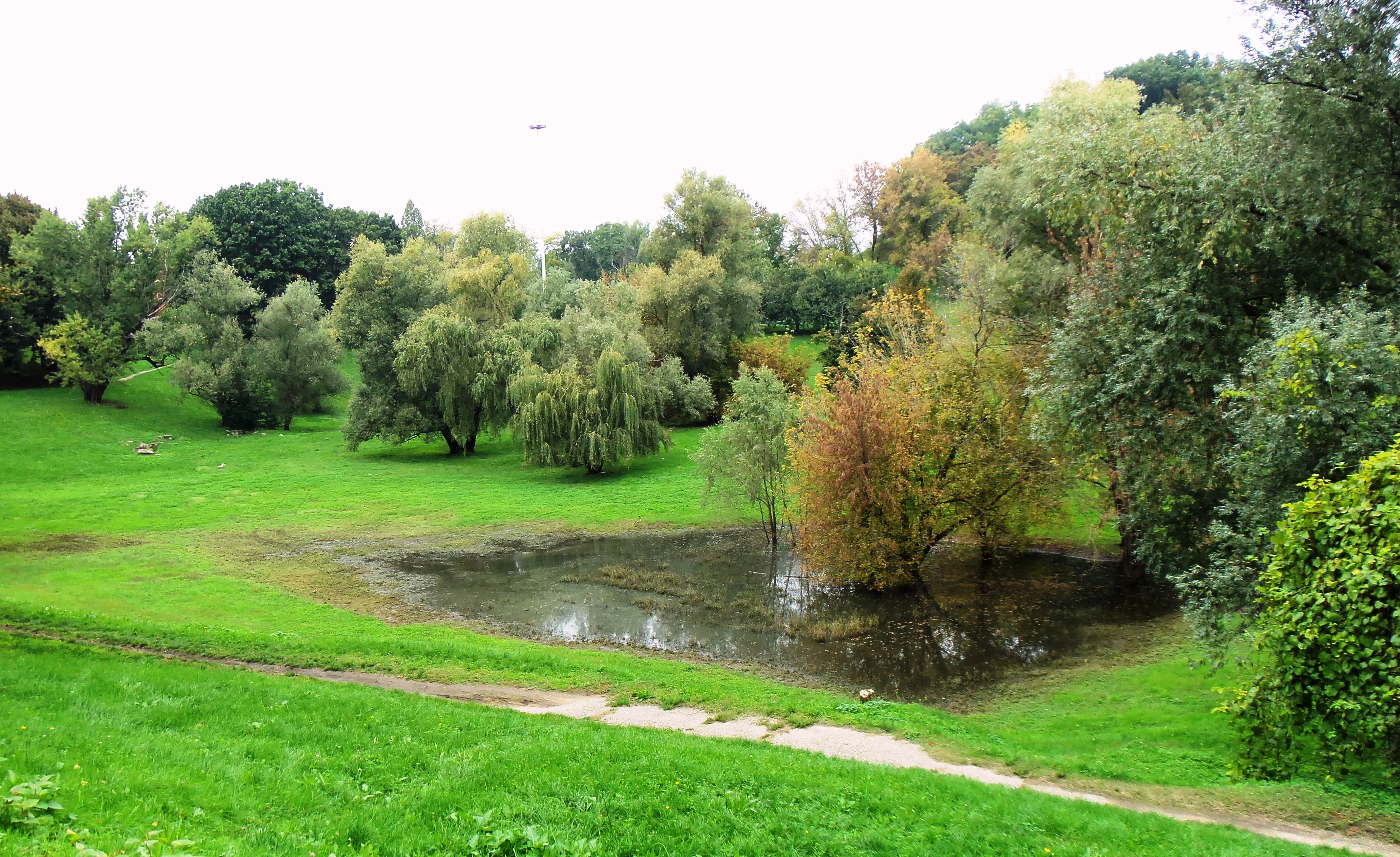 Milano, parco Lambro, un avvallamento che un tempo ospitava un laghetto, dopo la pioggia. ra la vegetazione spiccano i salici